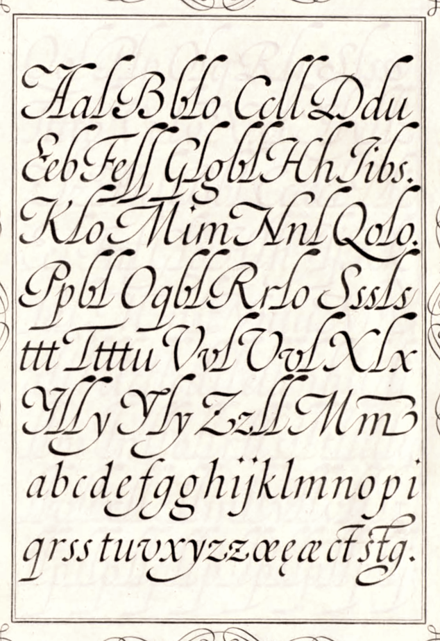 Plancha número 11 del Arte de Escribir de Francisco Javier de Santiago Palomares (1776). El grabador es Francisco Asensio y Mejorada. Es una talla dulce (grabado calcográfico).